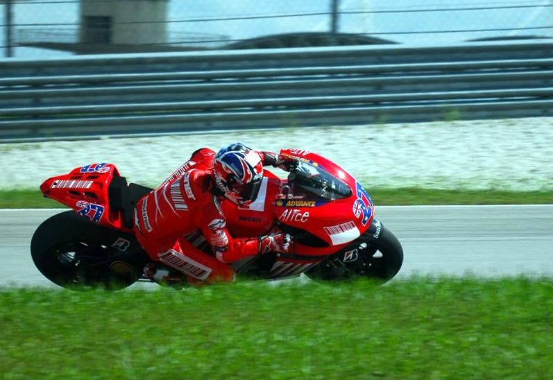 MotoGP 2007年シーズン 世界チャンピオン、ケーシー・ストーナー